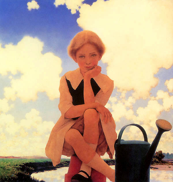 Maxfield Parrish (1870—1966). Mary, Mary, quite contrary. Oil on board, 1921.